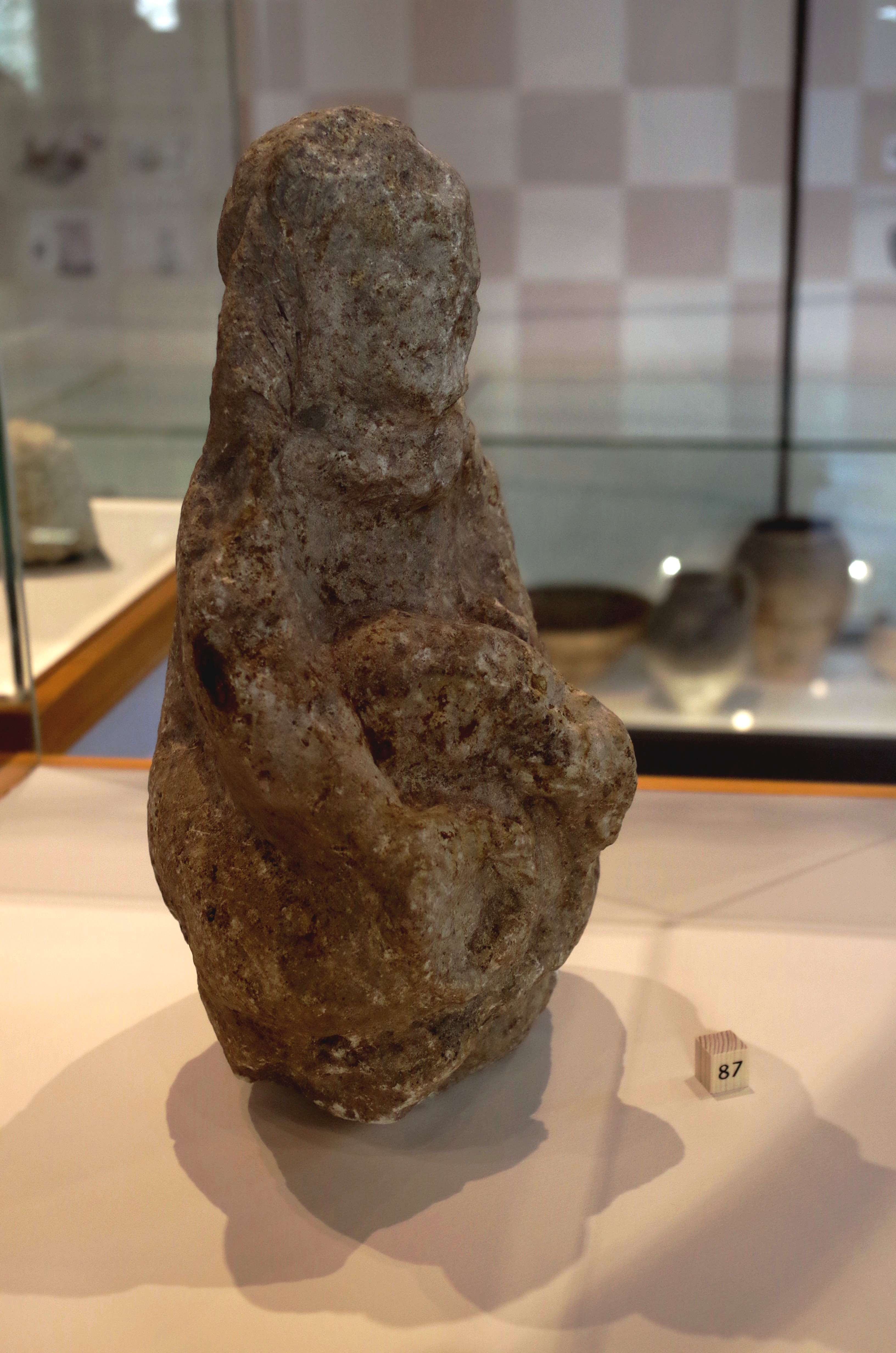 Statuette d' «assis en tailleur » avec animal cornu trouvée à Amboise. Voir Jean-Marie Laruaz (dir.), Ambacia, la Gauloise - 100 objets racontent la ville antique d'Amboise, Chemillé-sur-Dême, Archéa, 2017, p. 114-115.